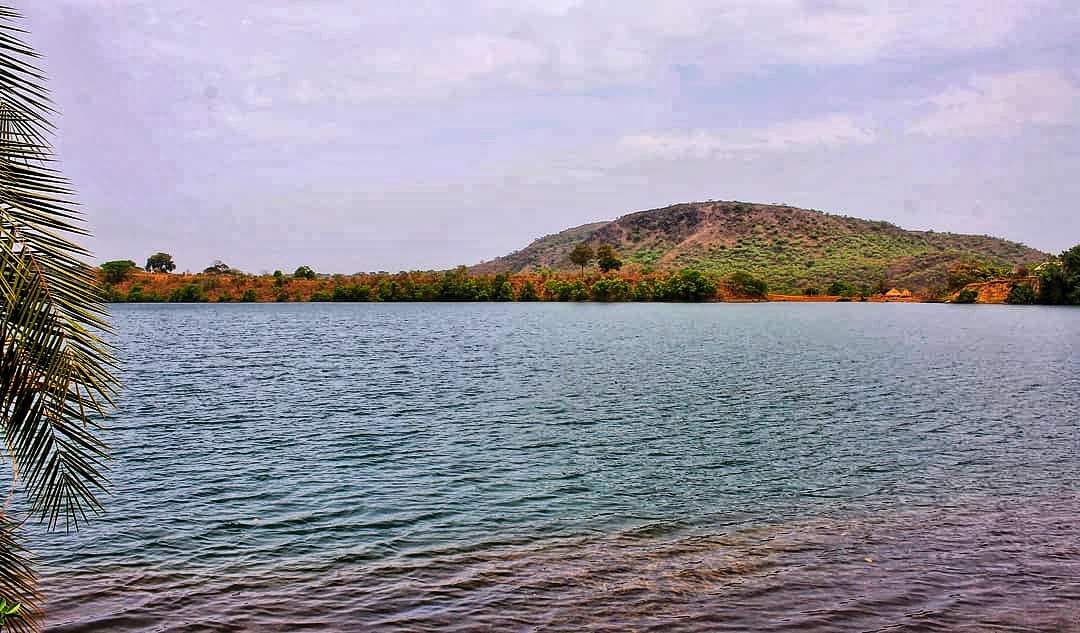 Le lac de Mballang en saison sèche, situé à quelques kilomètres de Ngaoundéré